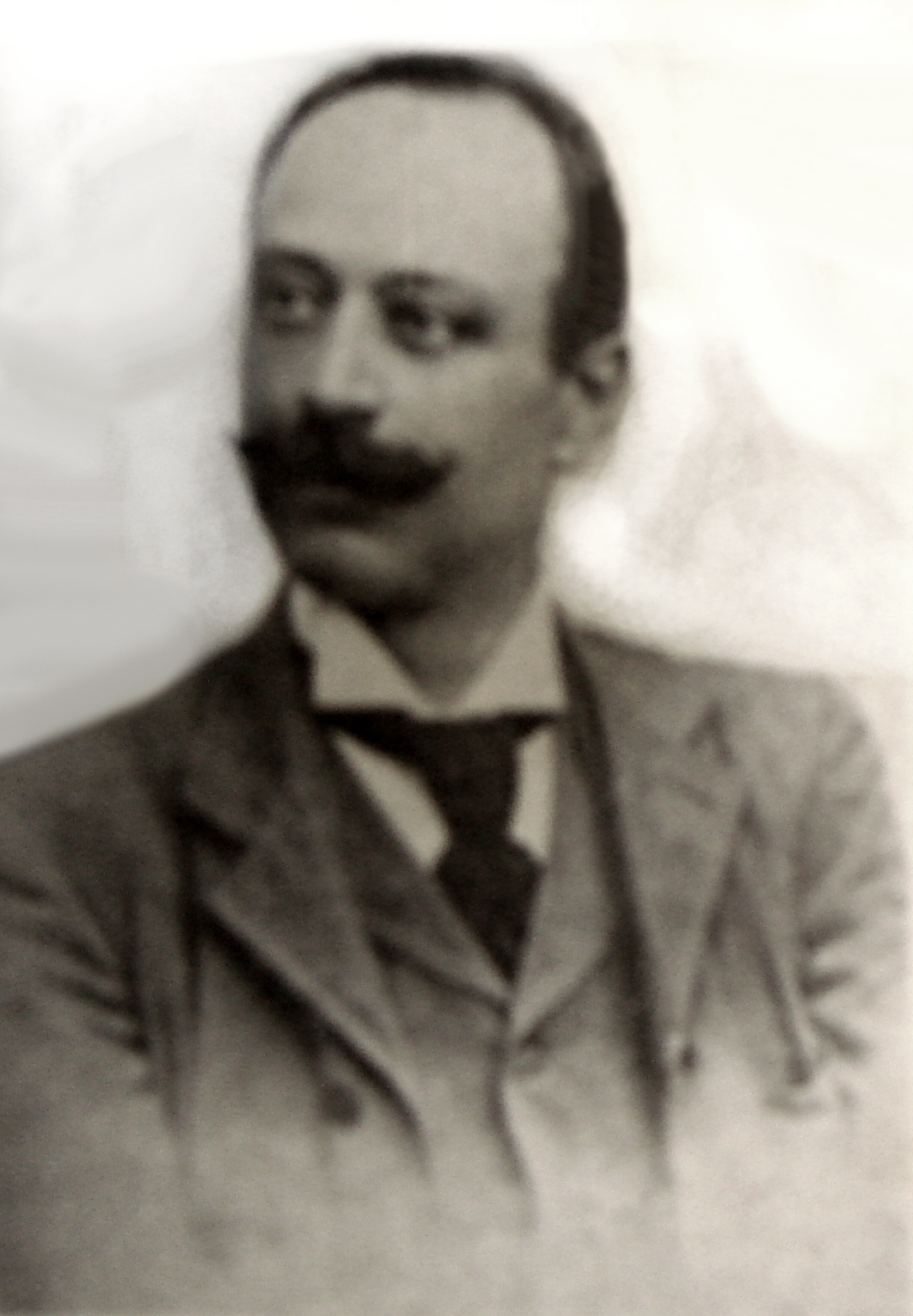 Giovanni Capurro. Sono il proprietario della fotografia